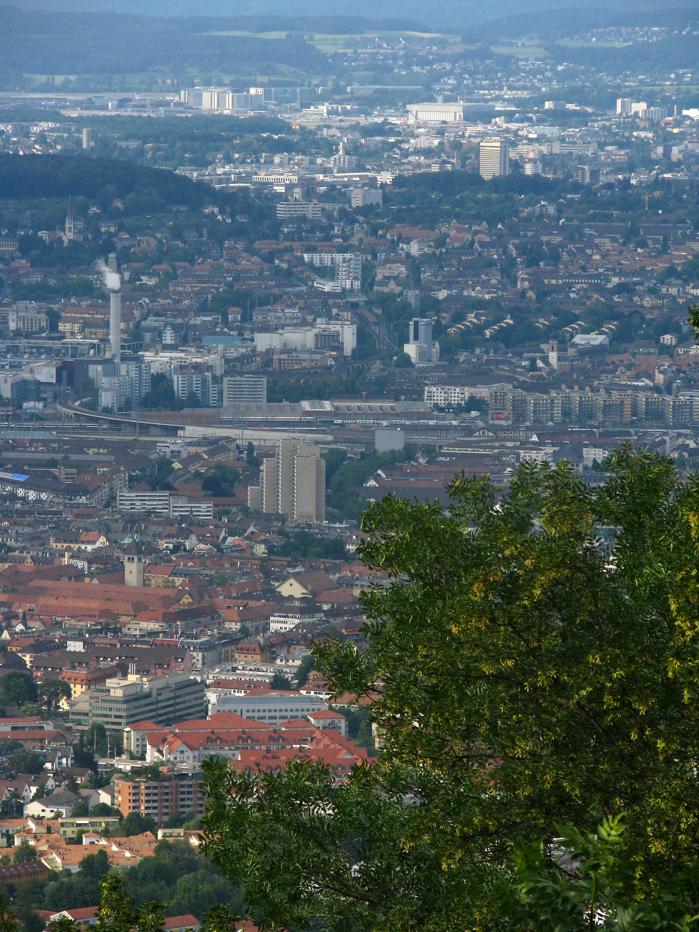 Zürich, Opfikon amd Kloten (Switzerland), as seen from Albis